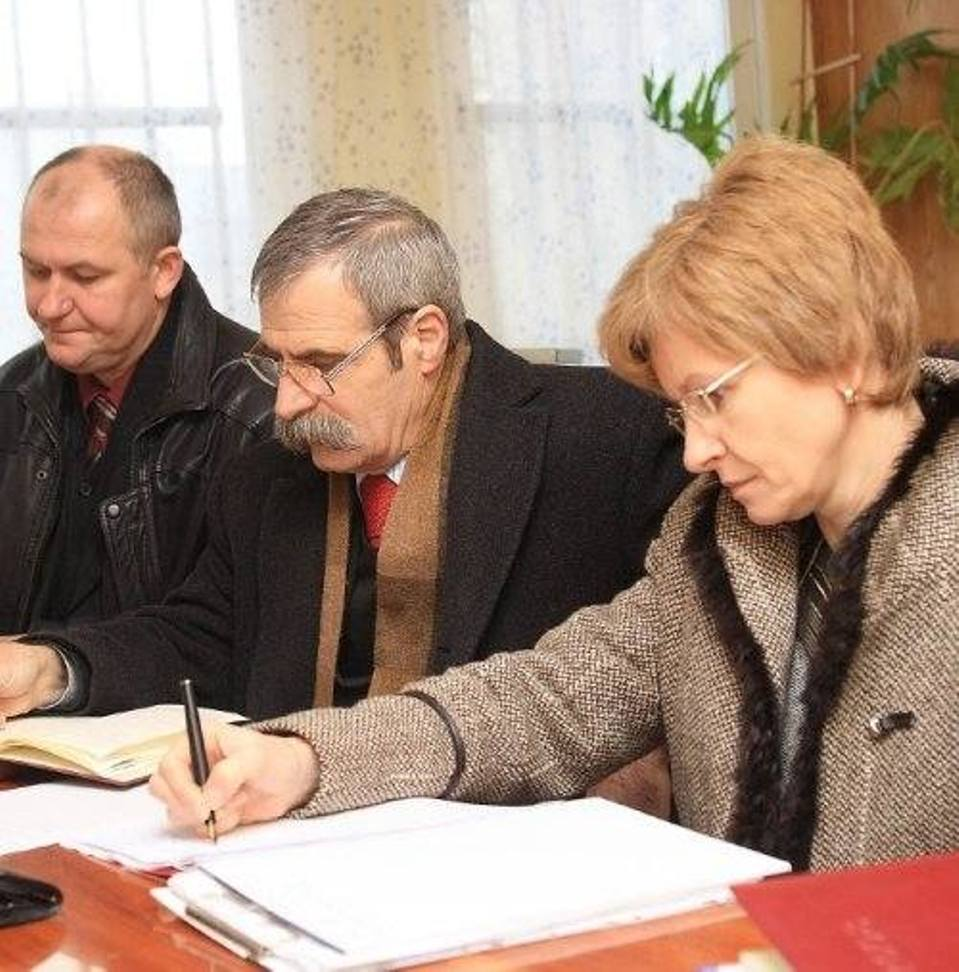 Dyrektor szpitala Grażyna Gregorowicz w towarzystwie starosty Waldemara Gila (w środku) i wicestarosty Witolda Rucińskiego